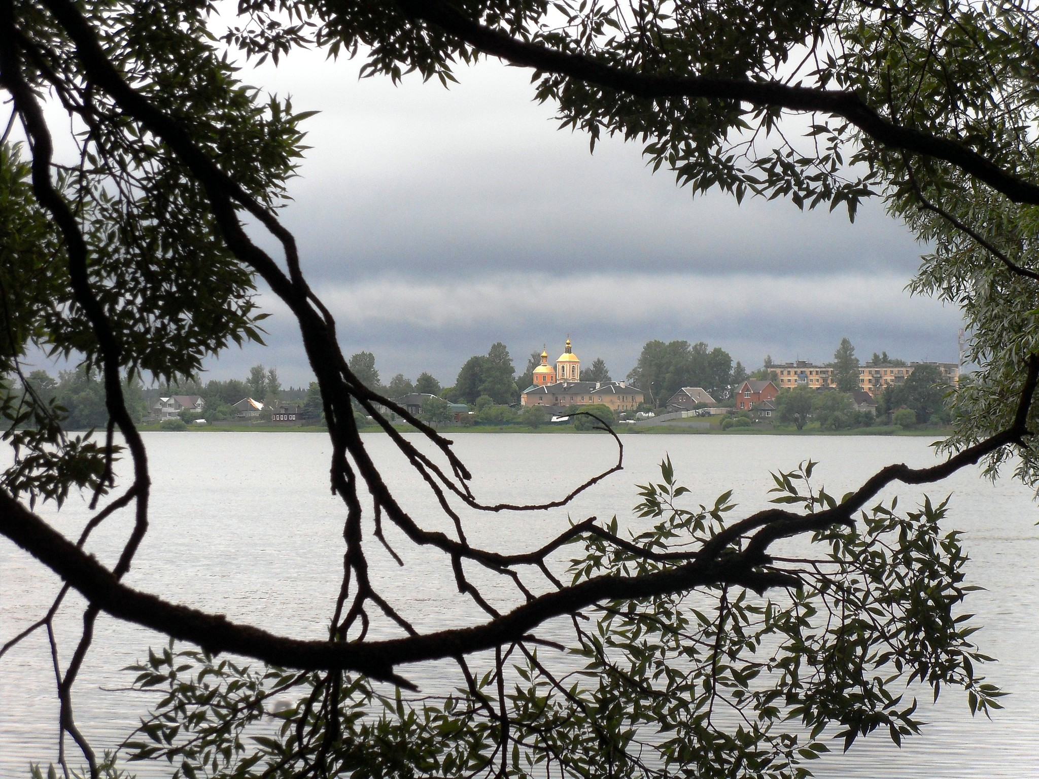 Озеро Бологое и лес вокруг озёр Бологое и Глубокое: Бологовский район, Тверская область This image is related to the protected area of Russia number 6910125